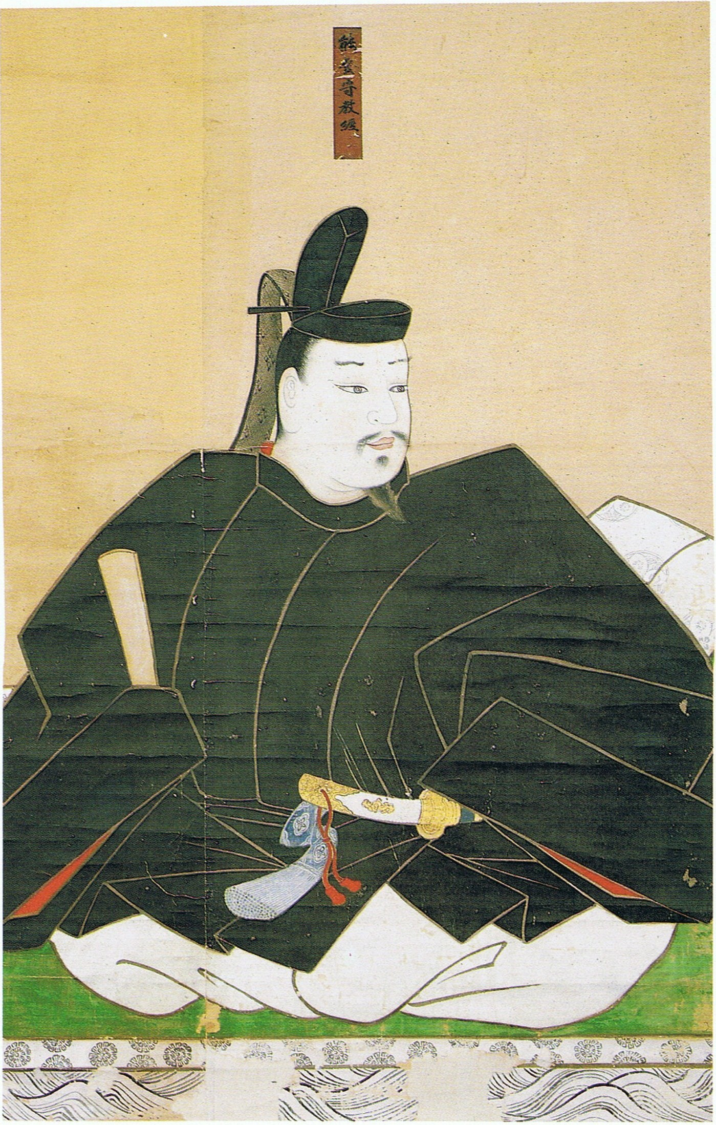 平教経像